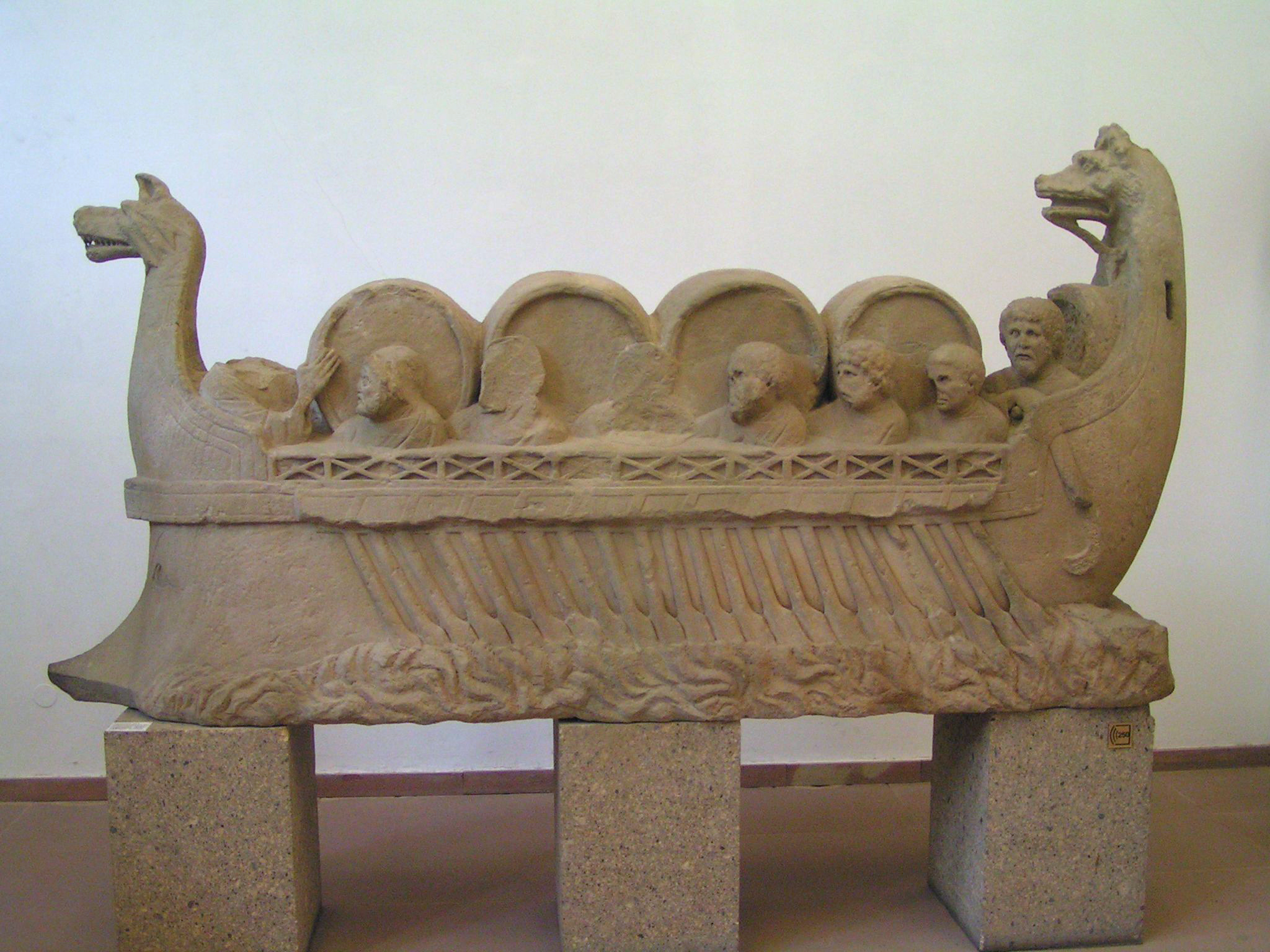 Neumagener Weinschiff 诺依玛根运酒船